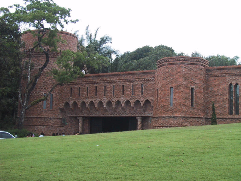 Instituto Ricrado Brennand - Recife